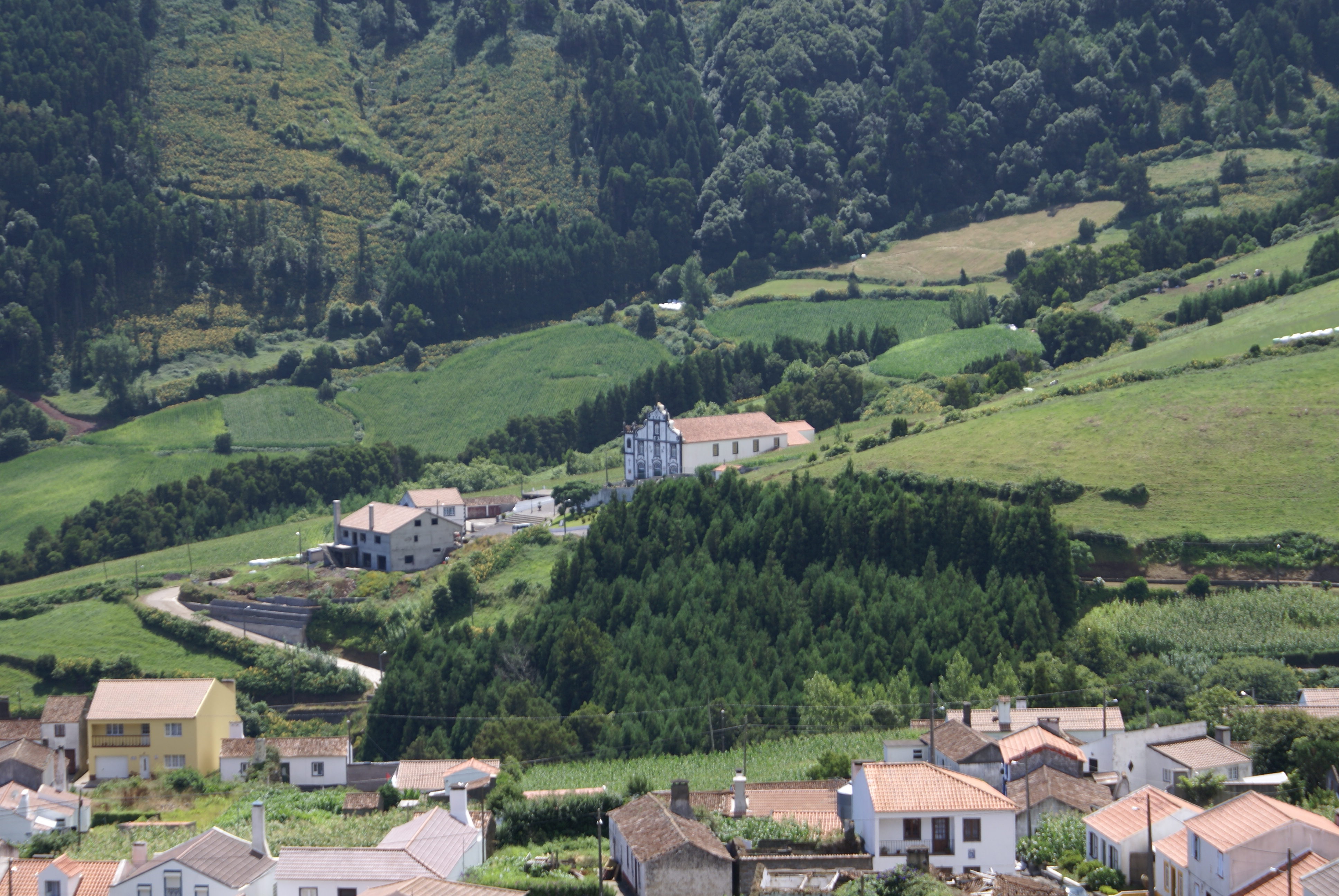 Vista parcial de Água Retorta, Povoação, ilha de São Miguel, Açores